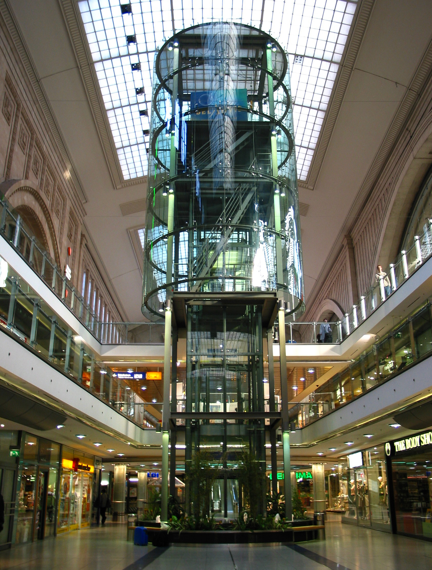 Gläserner Aufzug mit Abfahrtsanzeigetafel inmitten der Querbahnsteighalle mit den PROMENADEN Hauptbahnhof nach den Umbauarbeiten 1995 bis 1997.